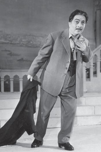 Rəşid Behbudov Sevil operasında Balaş rolunda, 1959, Baku